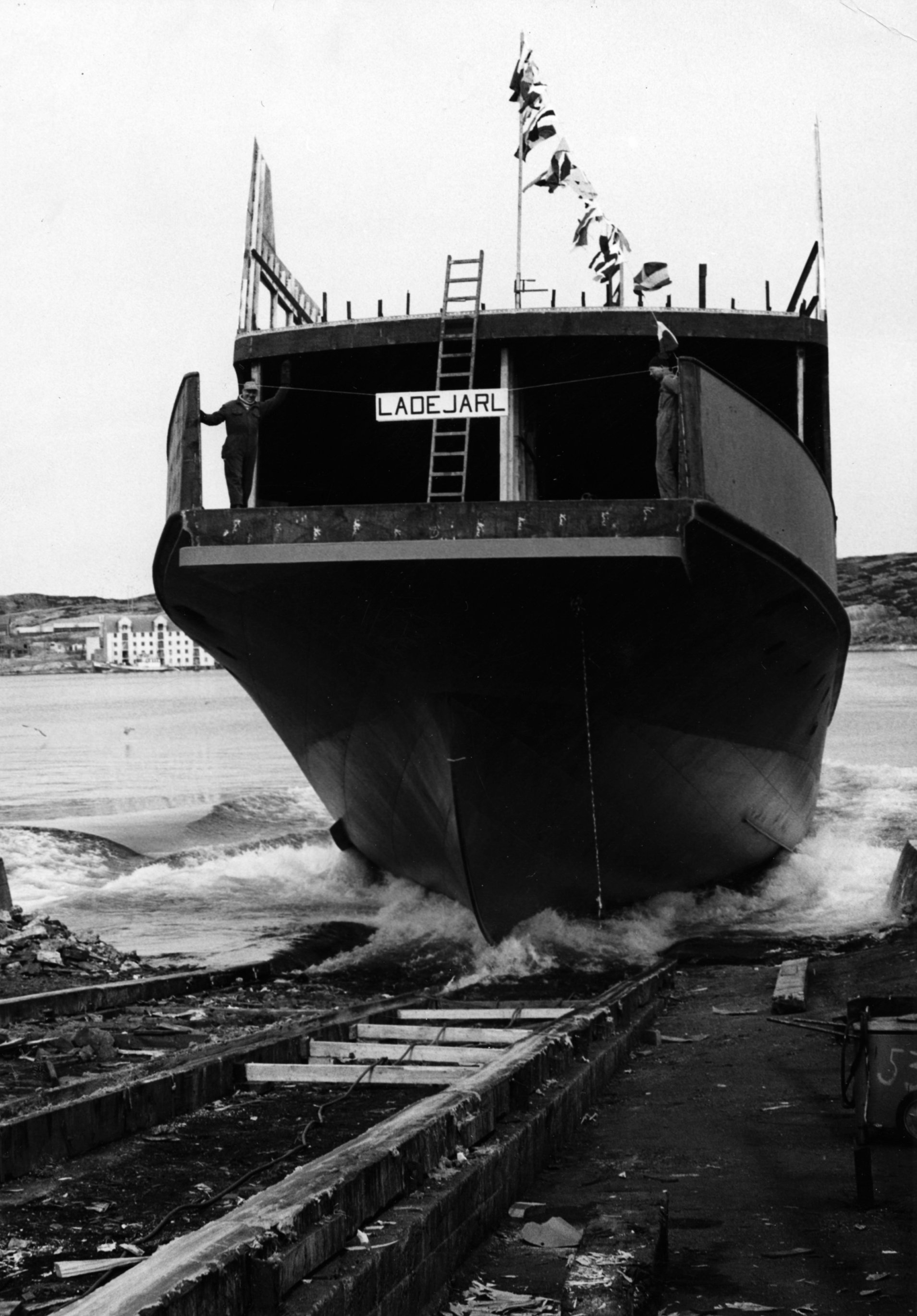 Format: Fotopositiv Dato / Date: April 1966 Fotograf / Photographer: Ukjent Sted / Place: Trondheim Wikipedia: Stabelavløpning Wikipedia: Fosen Trafikklag Lenke / Link: "Gjensyn med gamle travere" (Artikkel i Fosna-Folket) Lenke / Link: "Her ligger MF Ladejarl" (Artikkel i Fosna-Folket) Eier / Owner Institution: Trondheim byarkiv, The Municipal Archives of Trondheim Arkivreferanse / Archive reference: Tor.H42.B49.F3462